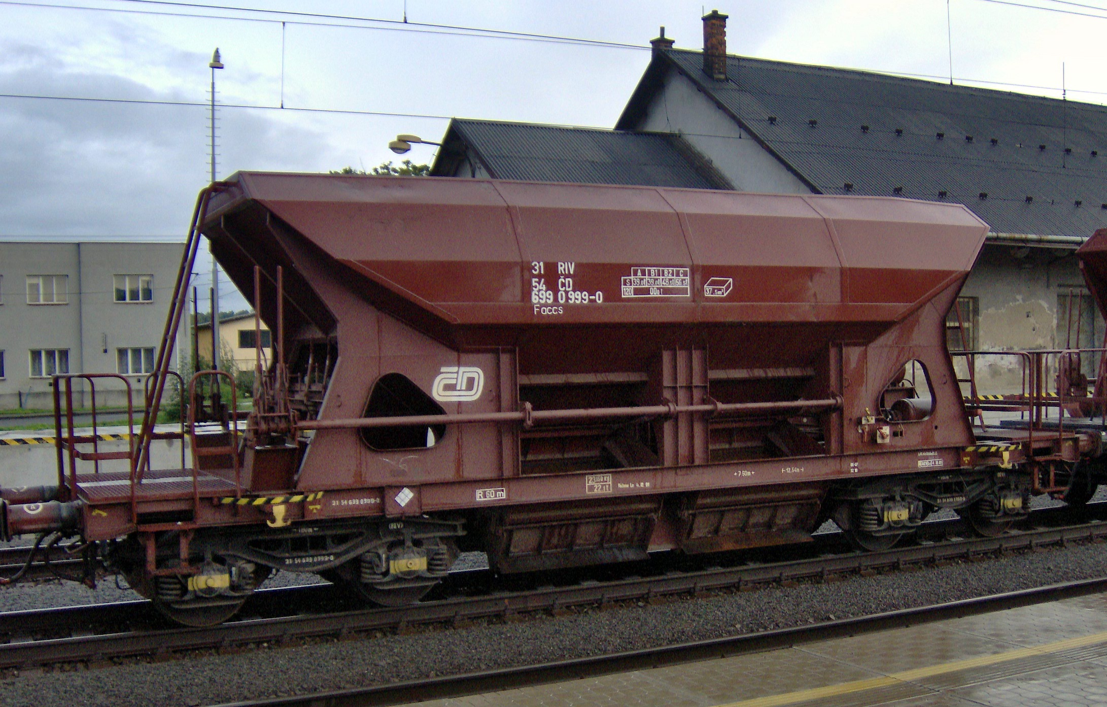 Výsypný nákladní vůz ČD ř. Faccs ev. č. 31 54 699 0 999-0, odchylně od jiných vozů této série vystrojený z výroby podvozky Y25. Snímek pořízen v žst. Suchdol nad Odrou.